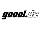 Logo von "goool.de"; einer Marke des ehemaligen Sportartikelunternehmens Goool.de Sportswear GmbH; einer Tochter des Fußball-Bundesligavereins Borussia Dortmund (2000-2008)